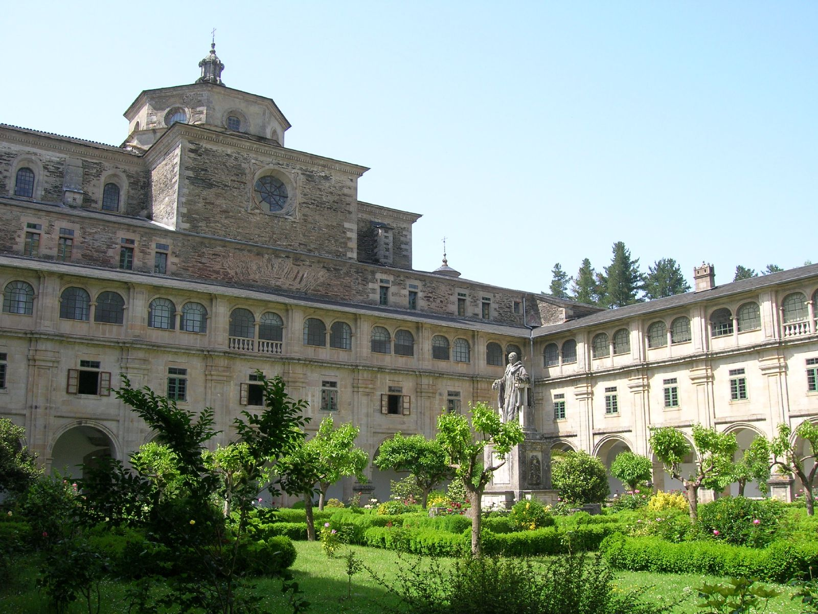 Mosteiro de San Xulián de Samos, Samos, Galicia - España.